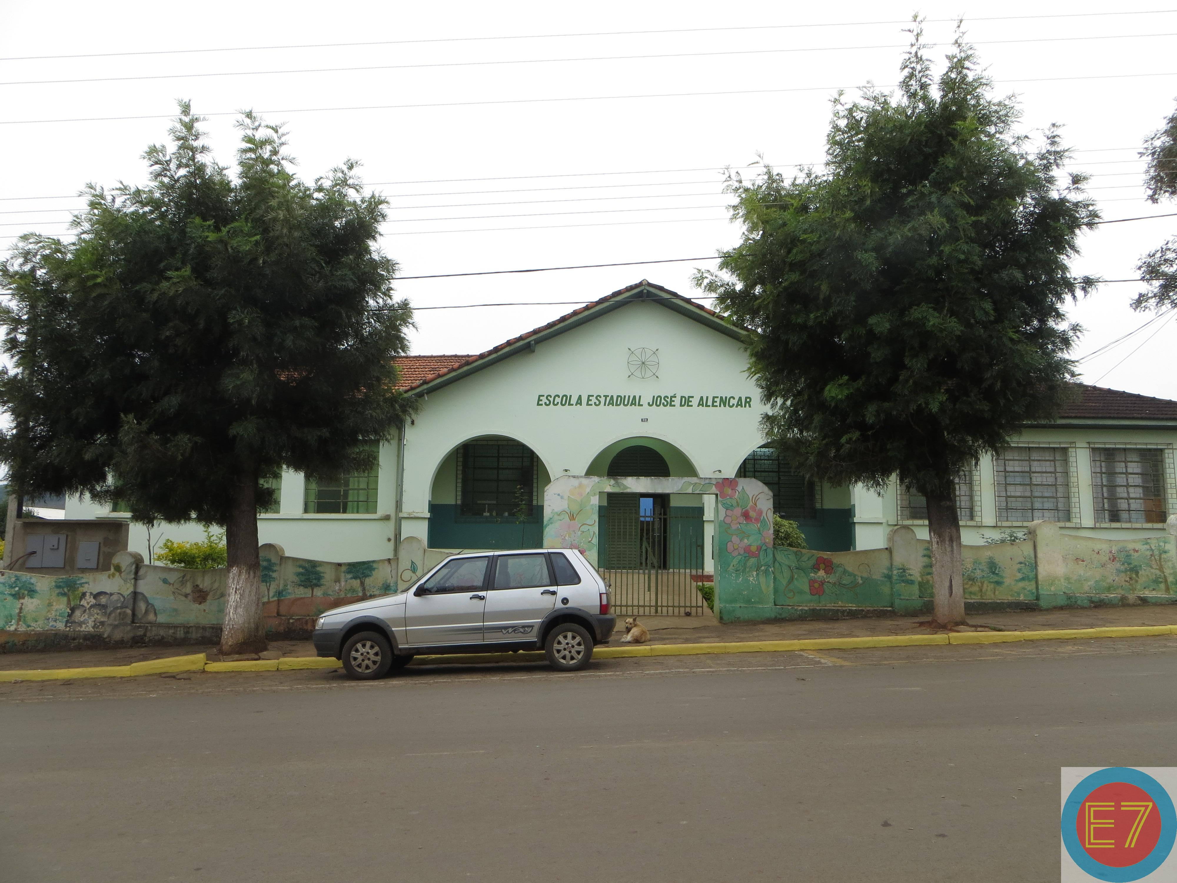 Colégio Estadual José de Alencar, em Curiúva, Estado do Paraná, Brasil.